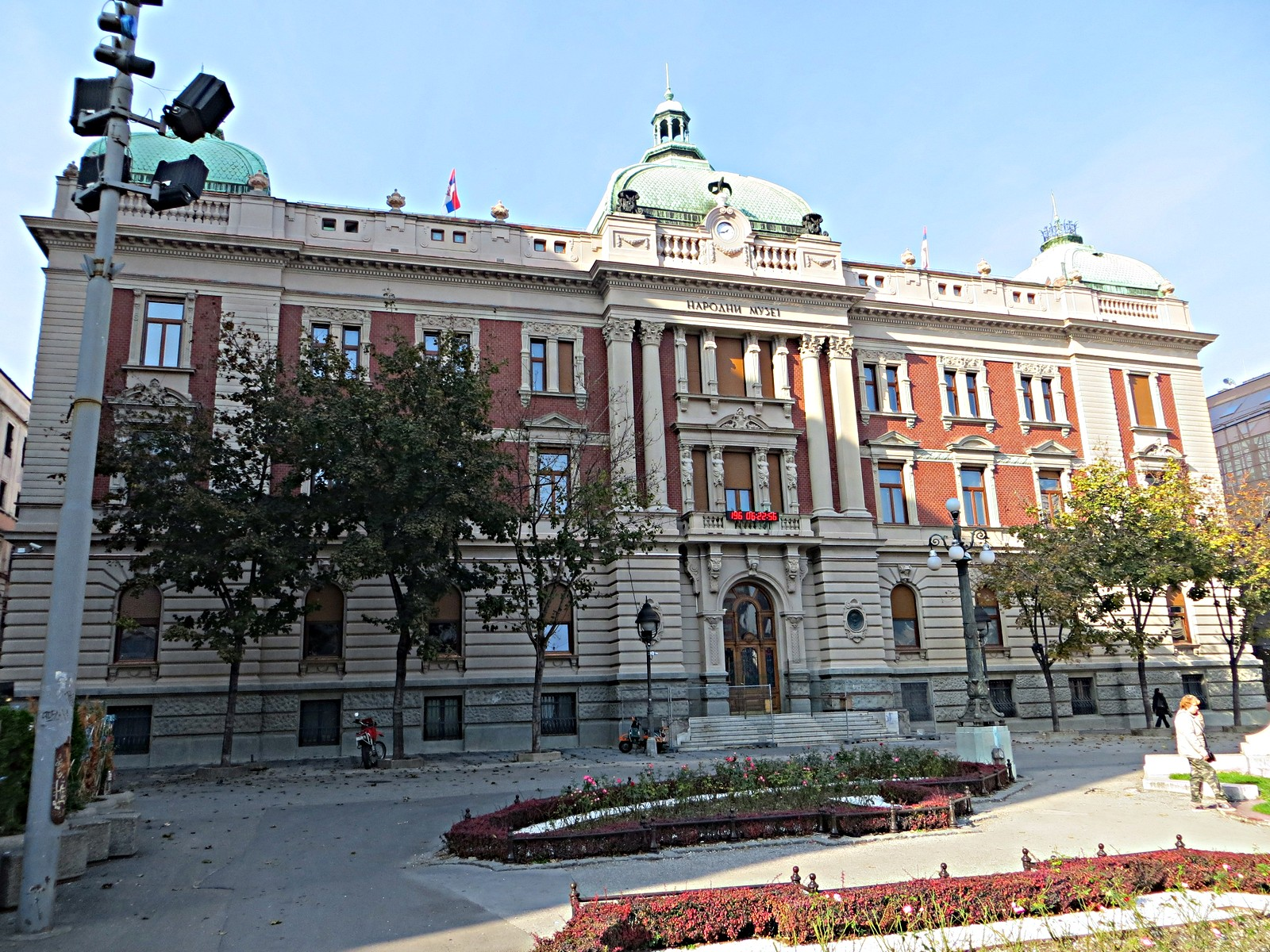 Narodni muzej